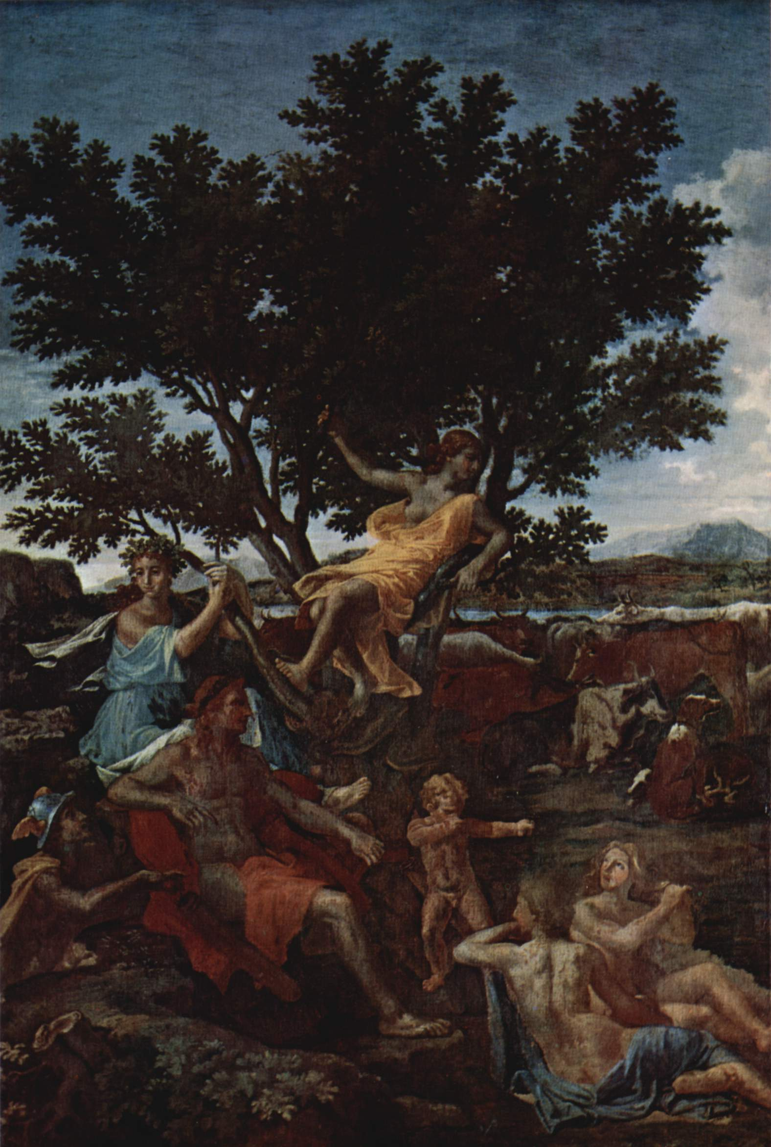 detail